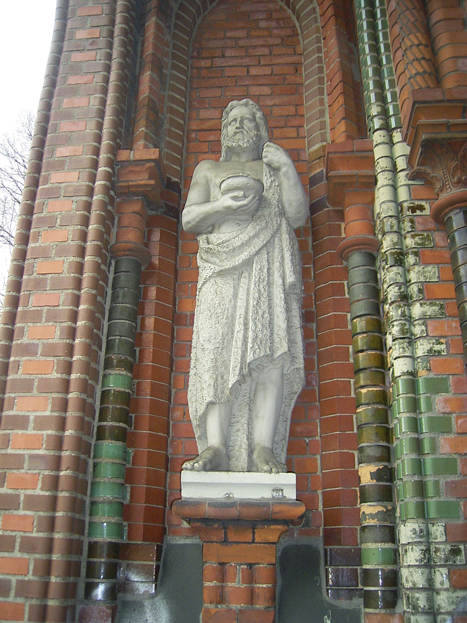 Die Figur Johannes des Täufers befindet sich am Eingang der St.Johannis-Kirche in Altona-Altstadt.